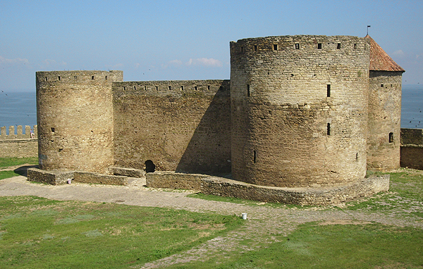 Аккерманская крепость (2010)